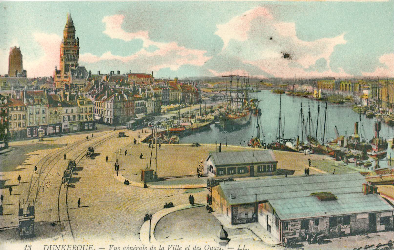 Carte postale ancienne éditée par LL, n°13 : DUNKERQUE - Vue générale de la Ville et des Quais